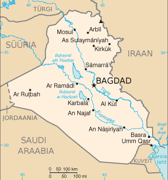 Iraagi kaart